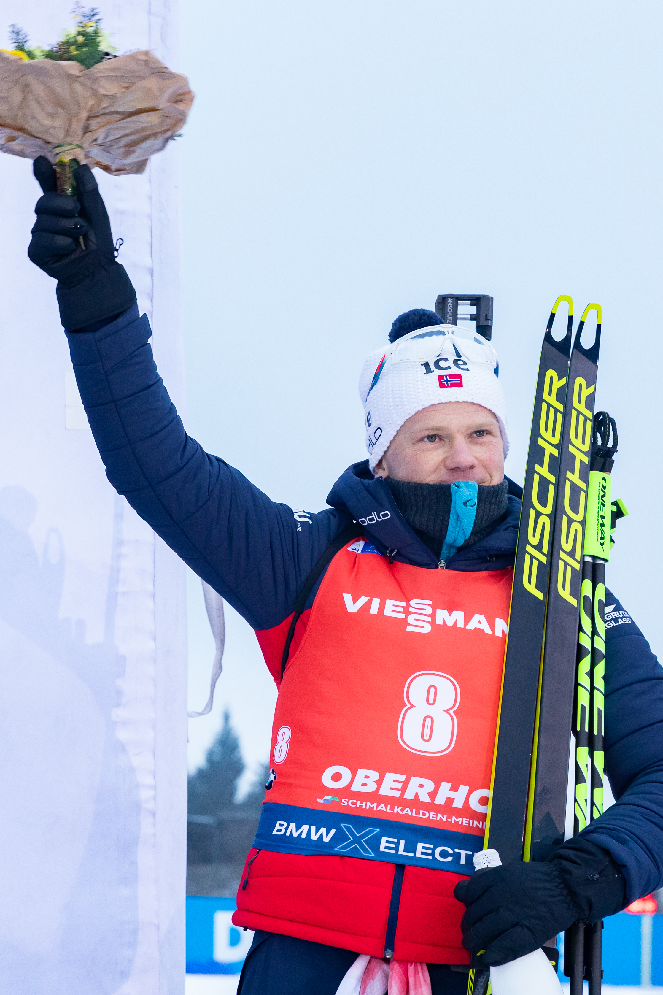 IBU World Cup Biathlon Oberhof; Johannes Dale (NOR, Norwegen); Platz 4 Massenstart Herren; Flower Ceremony, Blumenzeremonie, Siegerehrung; Jubel, celebration